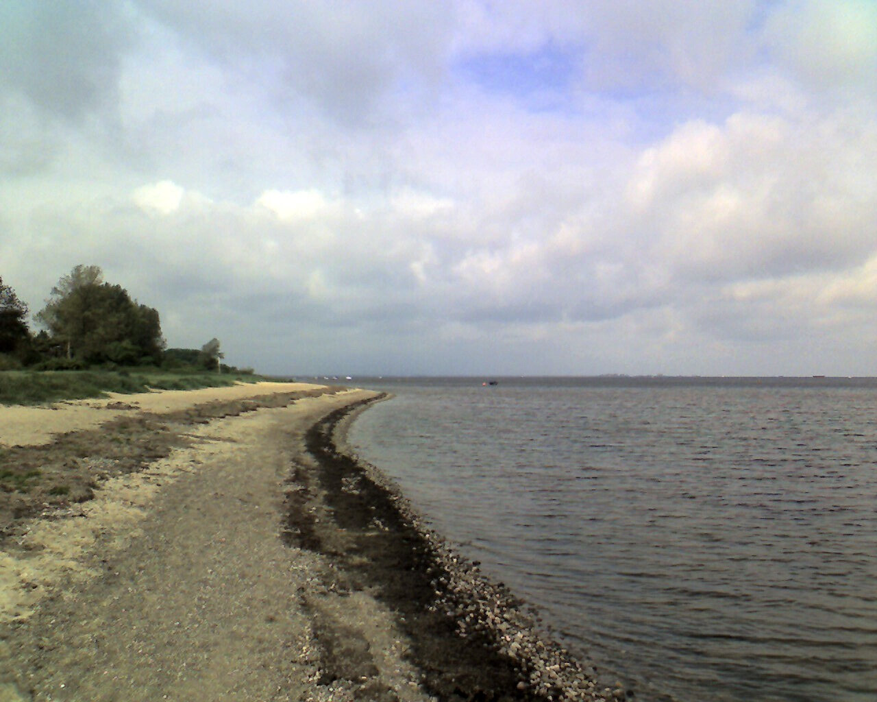 Strand in Vierow (Gemeinde Brünzow), Ende Mai 2006